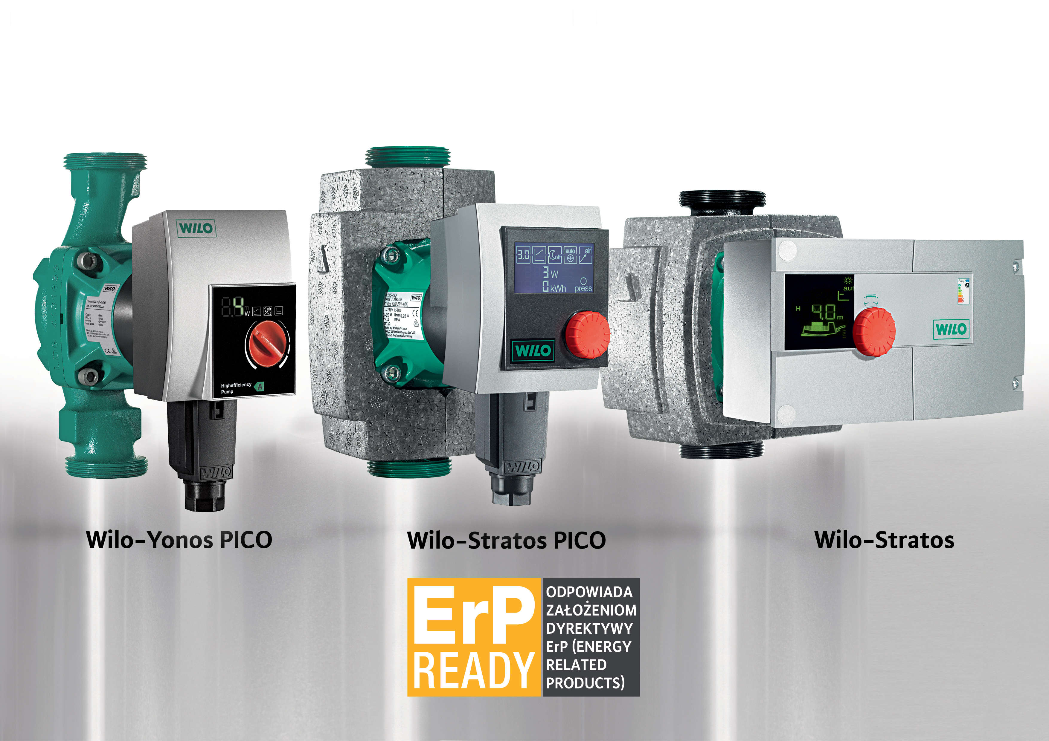 Pompy obiegowe najwyższej sprawności